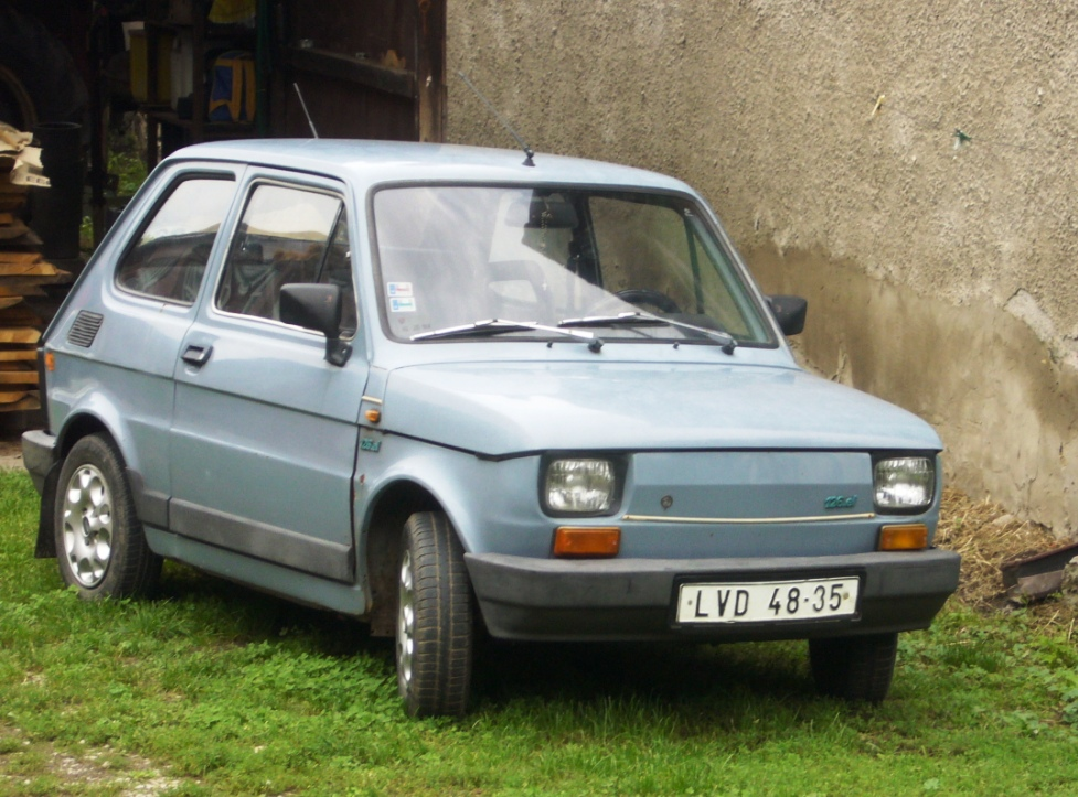 Fiat 126 s levickou ŠPZ vzoru O94 (LVD 48-35)